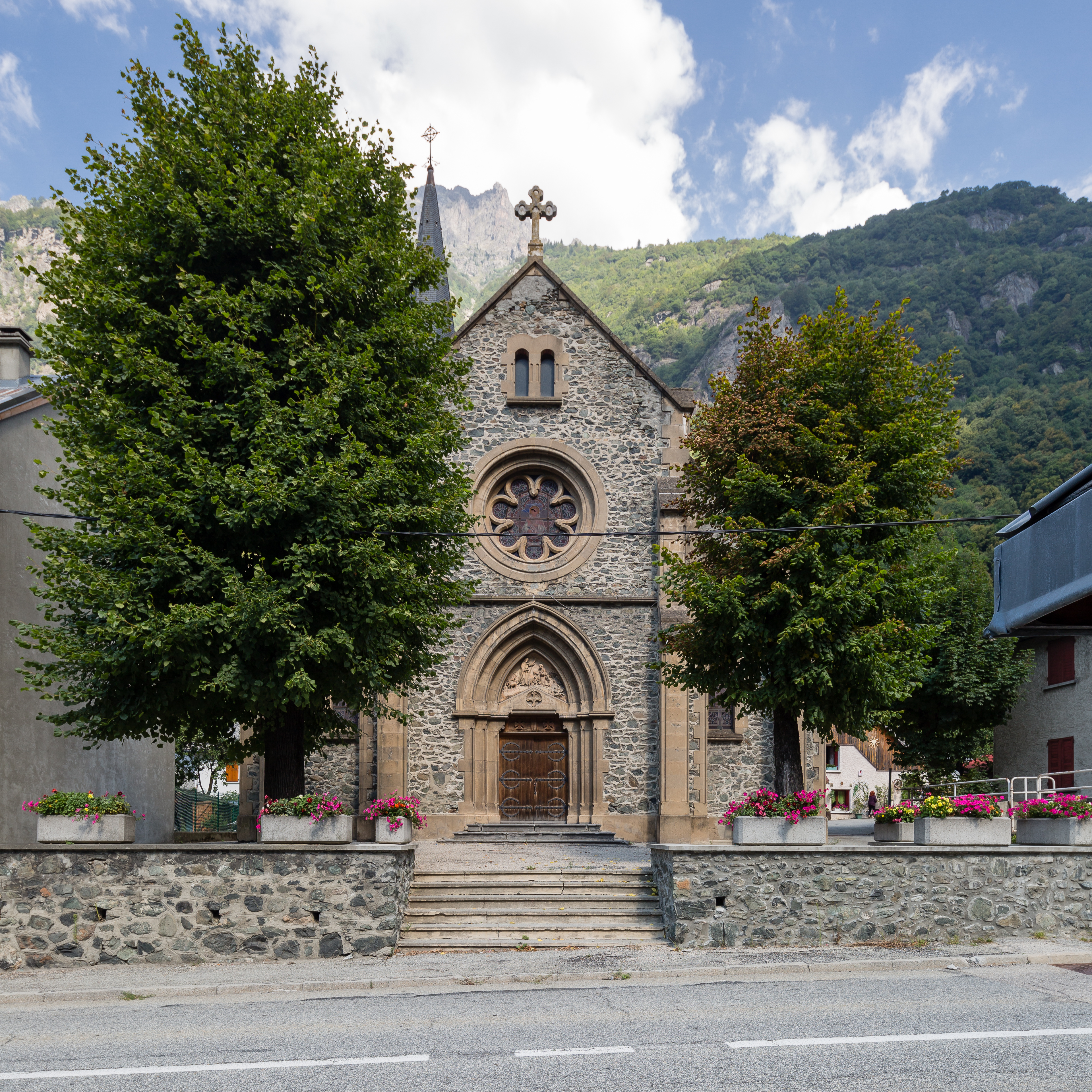 Façade de l'église Saint-Antoine de Livet-et-Gavet (France).